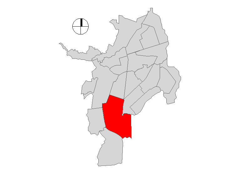 Comuna 17de Santiago de Cali, Colombia.